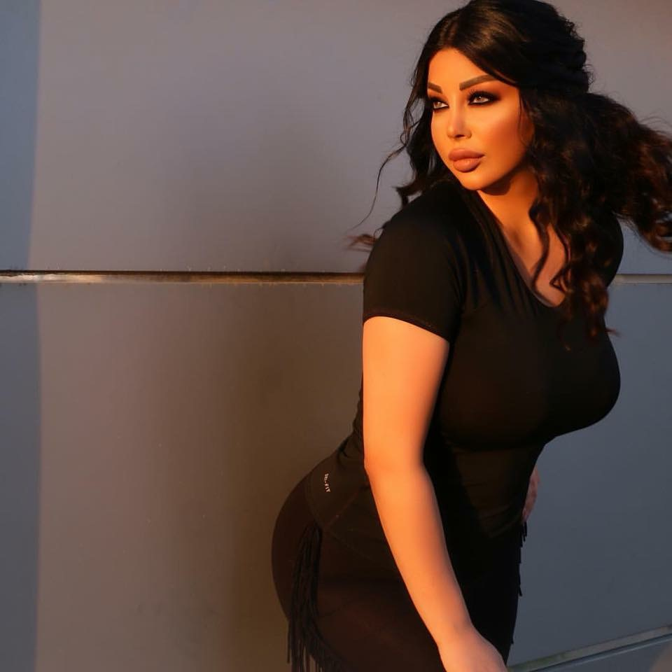 رولا يموت